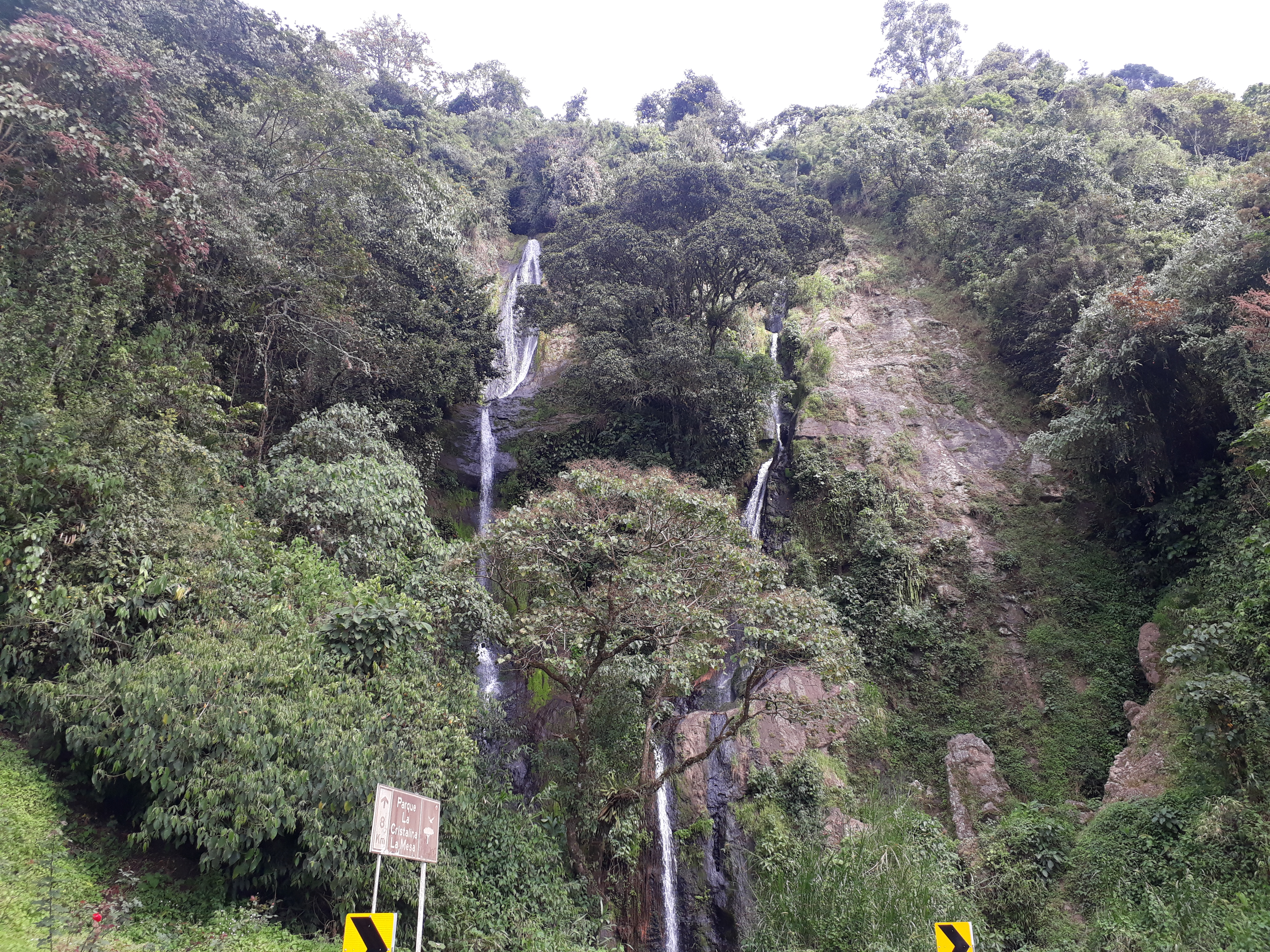 Vista de Los Chorros